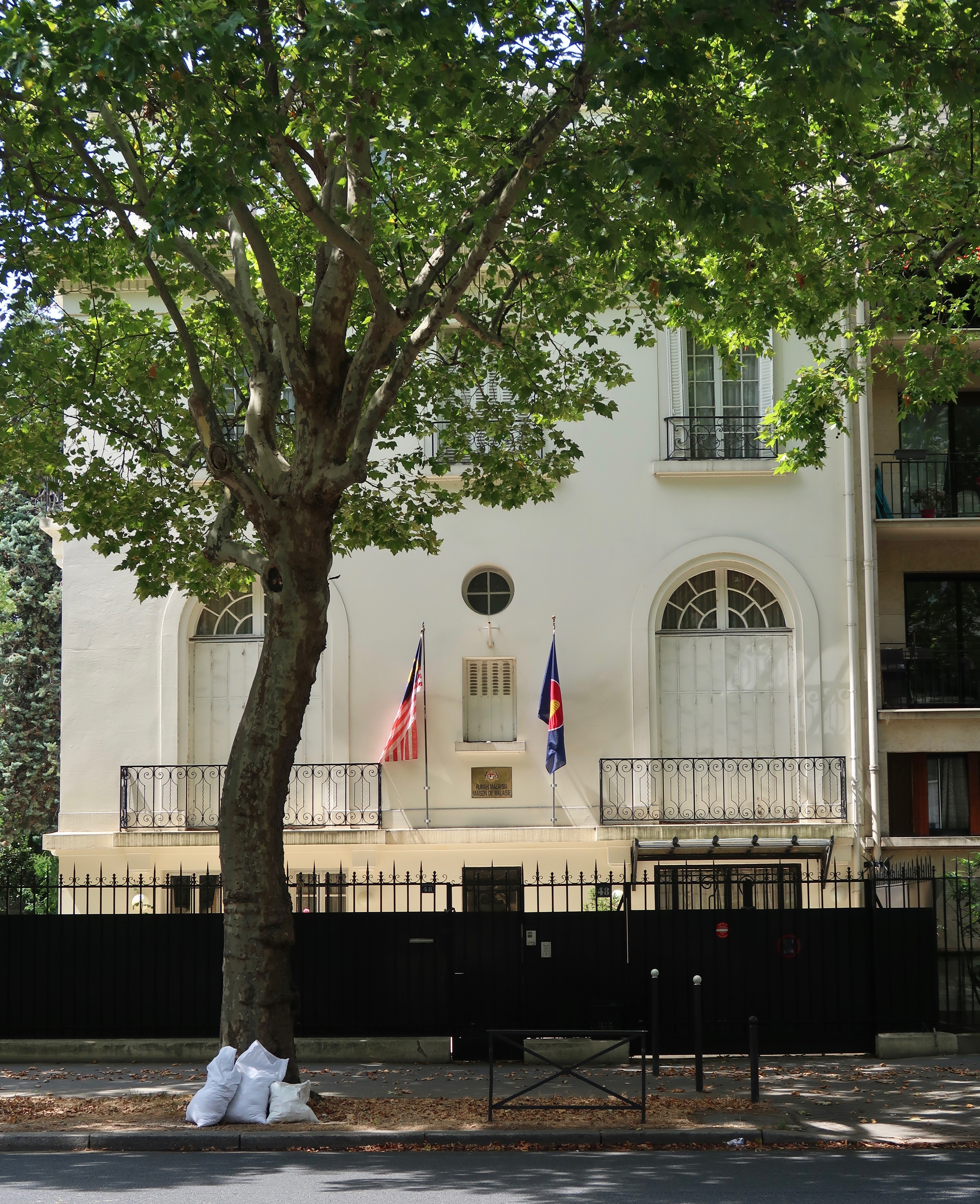 Maison de la Malaisie (résidence de l'ambassadeur), dans le 16e arrondissement de Paris, 48 boulevard Suchet (l'ambassade se trouve dans le même arrondissement, 2 bis rue Benouville).